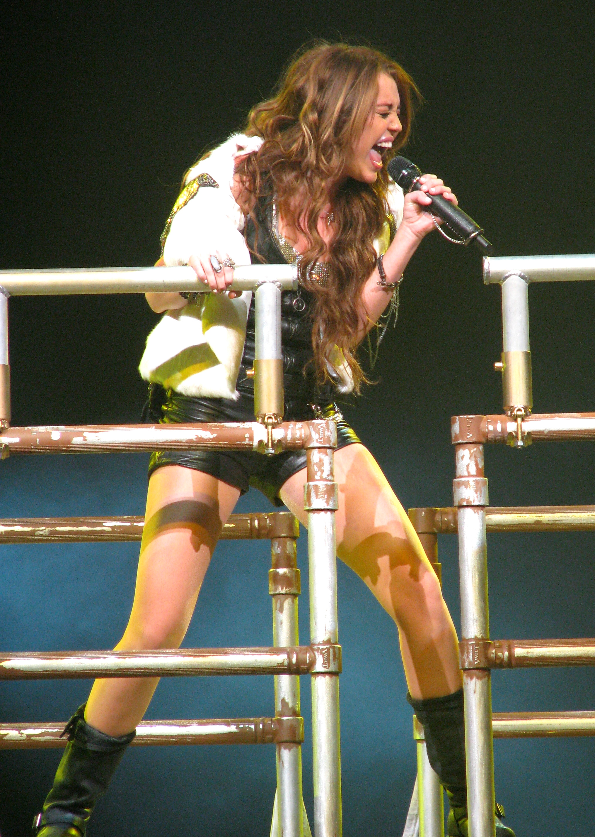 A teen singing.